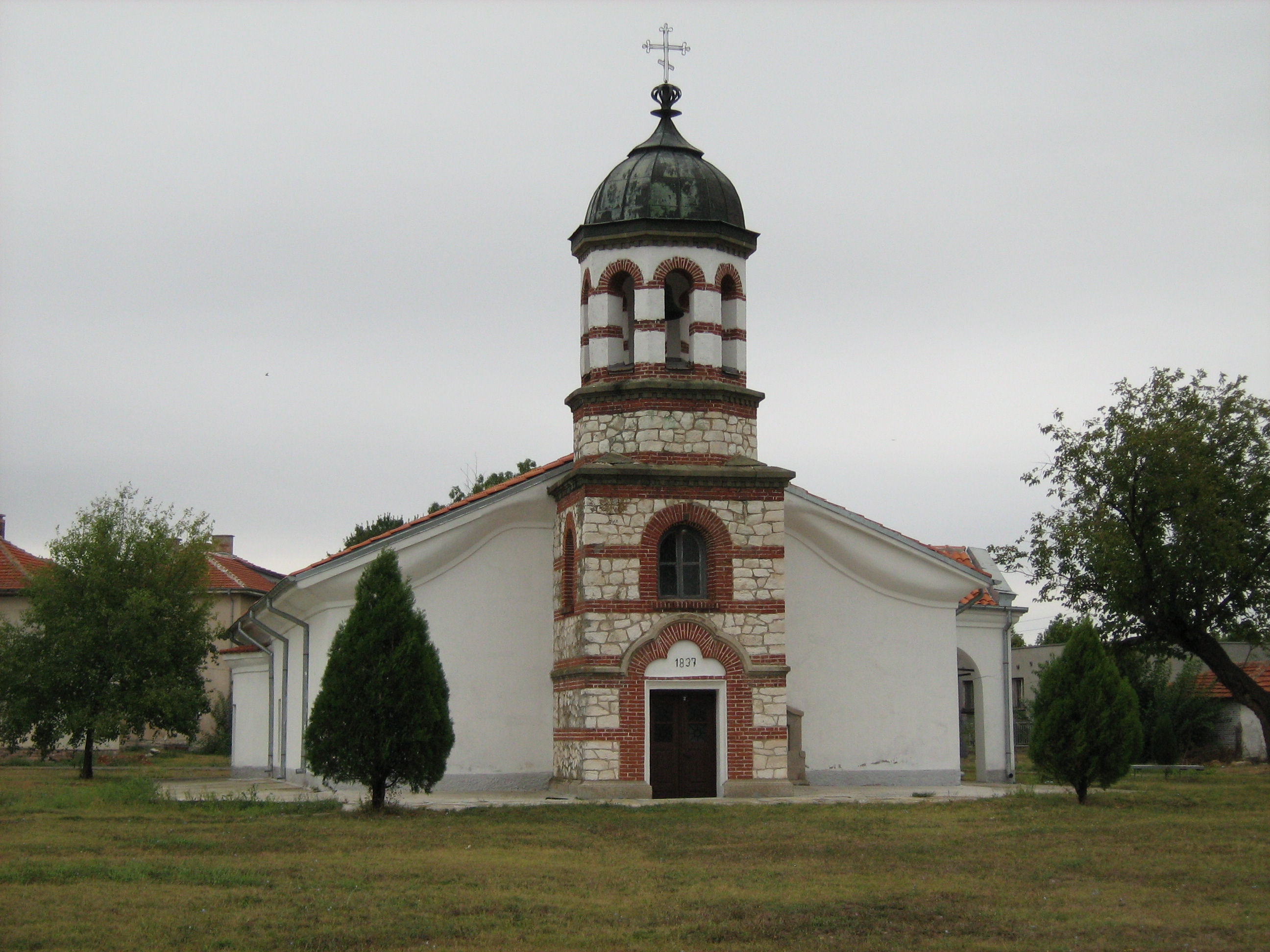 Изглед към камбанарията на храма "Св.В.М.Георги" ,село Любенова Махала.